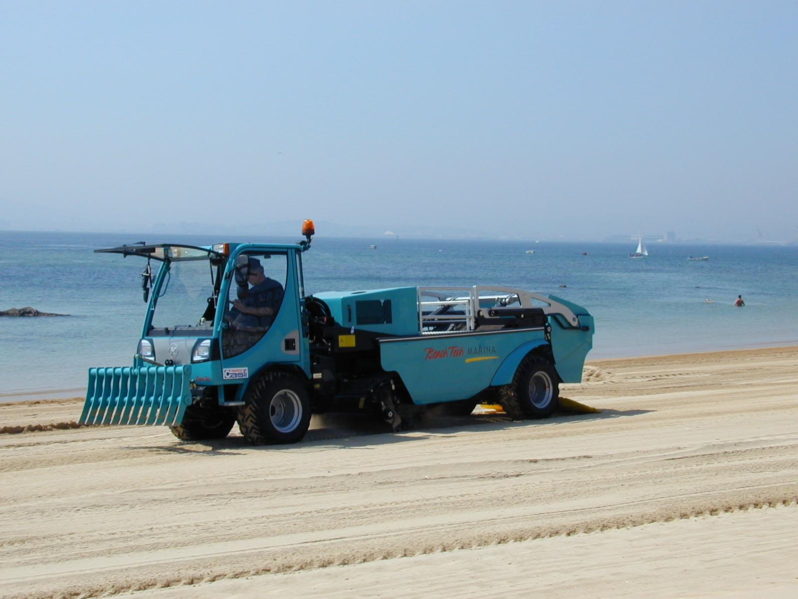 BeachTech Marina